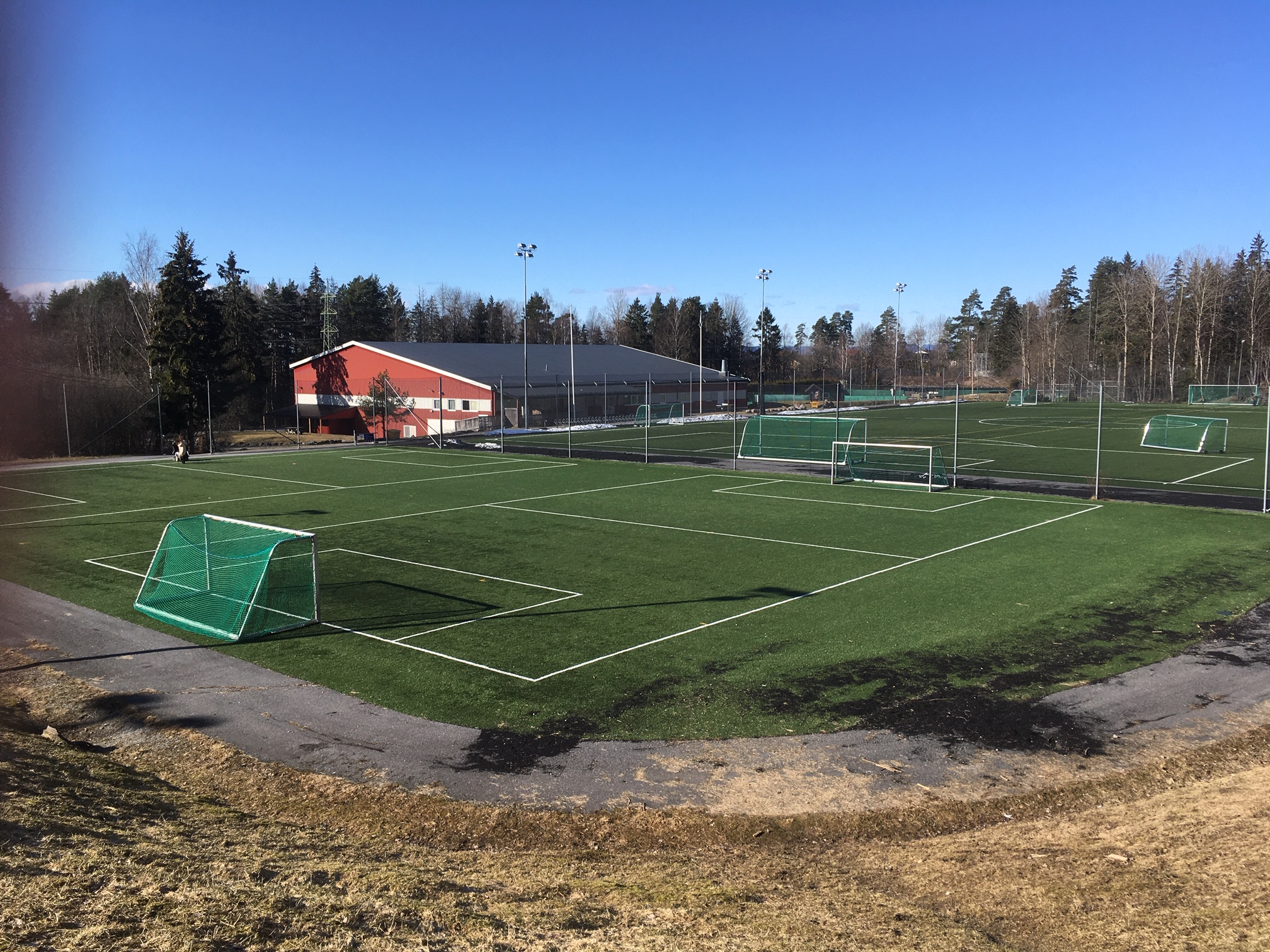 Prinsdalshallen i Oslo og idrettsbanen 2020